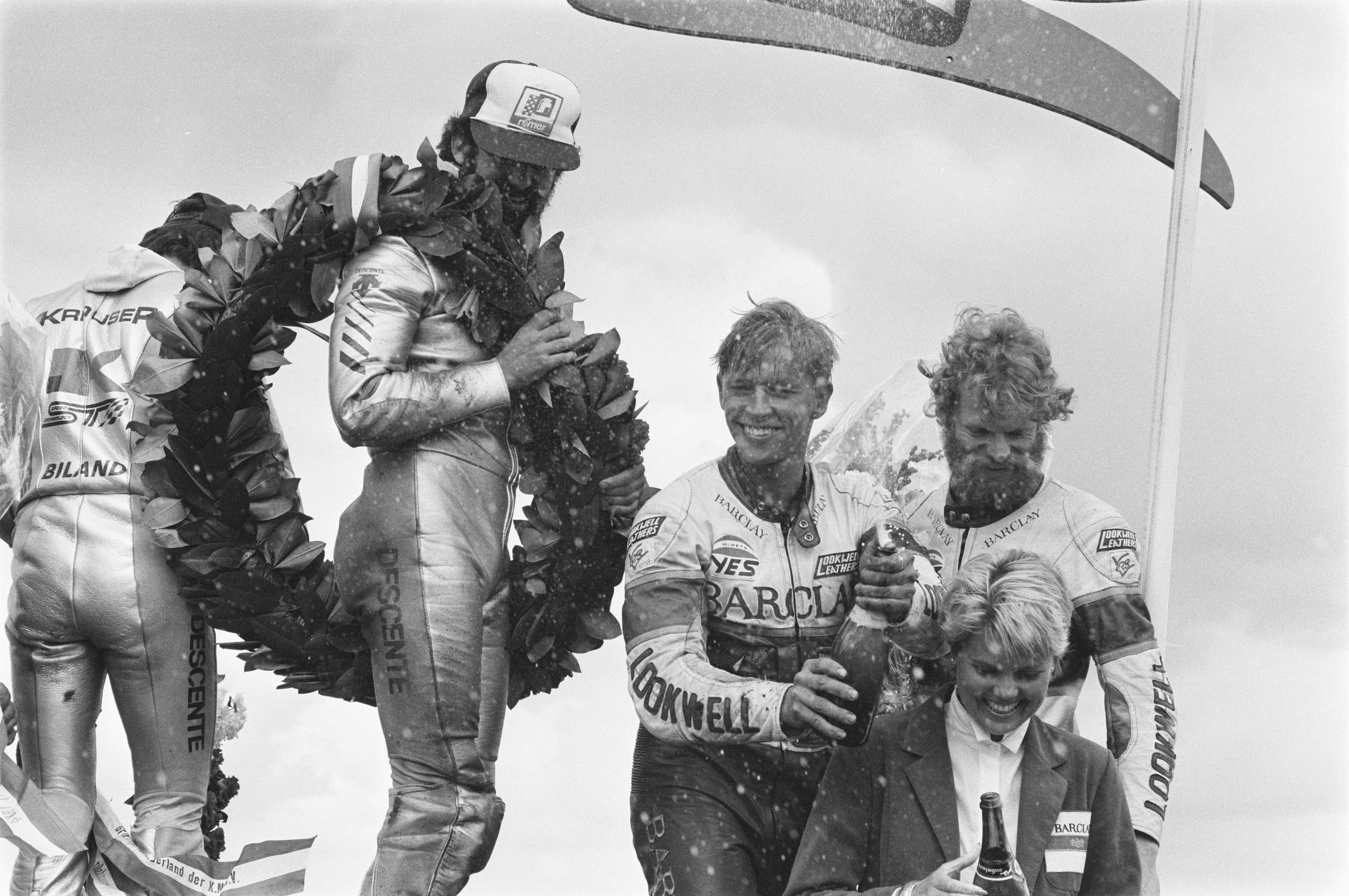 Collectie / Archief : Fotocollectie Anefo Reportage / Serie : TT Assen 1984 Beschrijving : TT van Assen, zijspanrace. Huldiging van de zijspanklasse, met v.l.n.r. winnaars Rolf Biland en Kurt Waltisperg, geflankeerd door Bernard Schnieders en Egbert Streuer (2e plaats). Datum : 30 juni 1984 Locatie : Assen Trefwoorden : motorcoureurs, motorfietsen, motorraces, motorsport, sport Persoonsnaam : Biland, Rolf, Schnieder, Egbert, Streuer, Egbert, Waltisperg, Kurt Instellingsnaam : TT Fotograaf : Antonisse, Marcel / Anefo Auteursrechthebbende : Nationaal Archief Materiaalsoort : Negatief (zwart/wit) Nummer archiefinventaris : bekijk toegang 2.24.01.05 Bestanddeelnummer : 933-0192